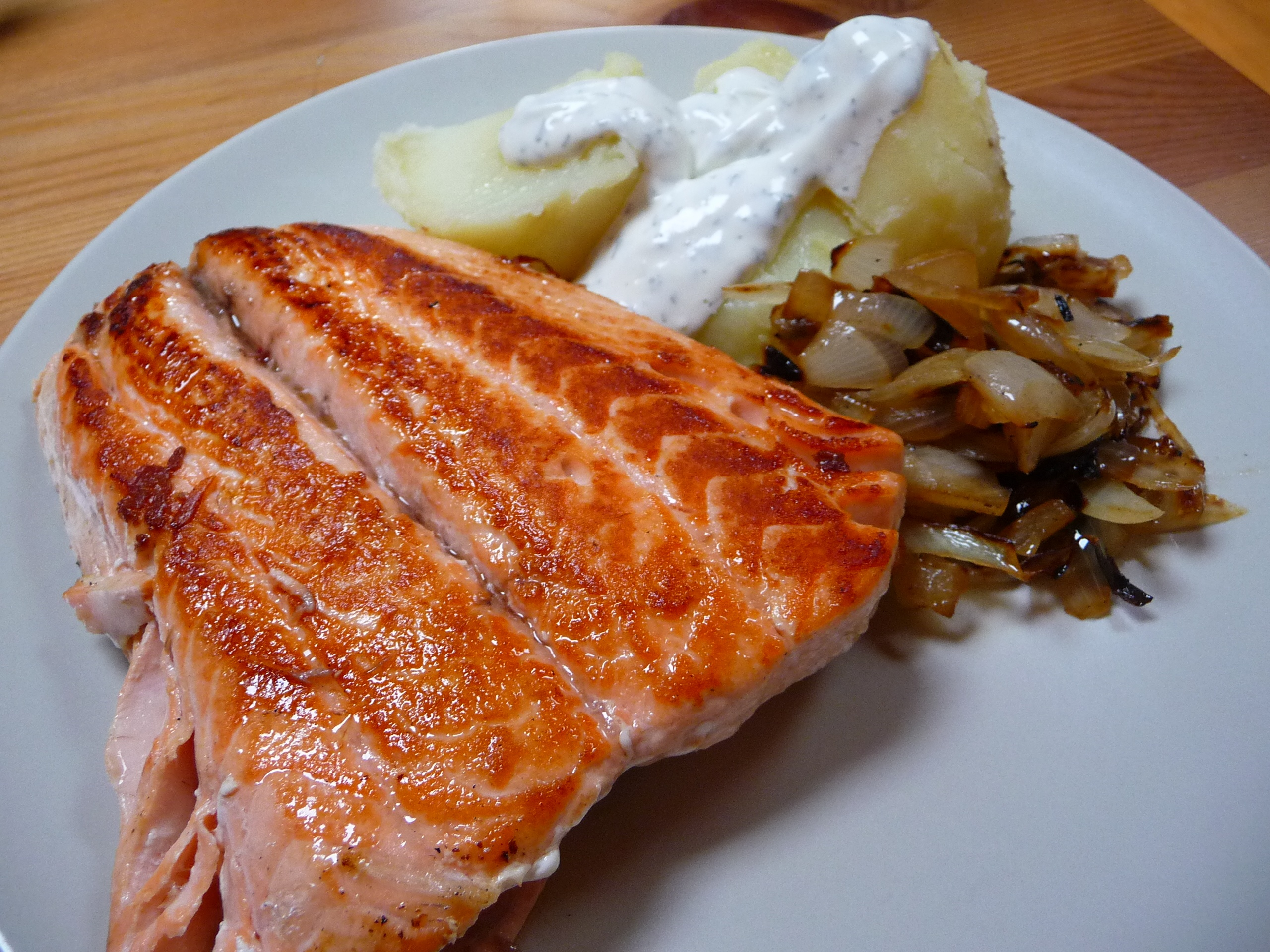 salmón a la plancha.